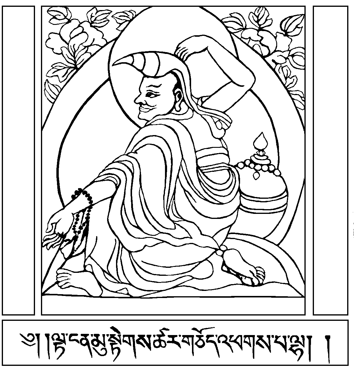 Hình được phép công bố của trang vi: ACIP Thể loại:Đồ tượng Phật giáo